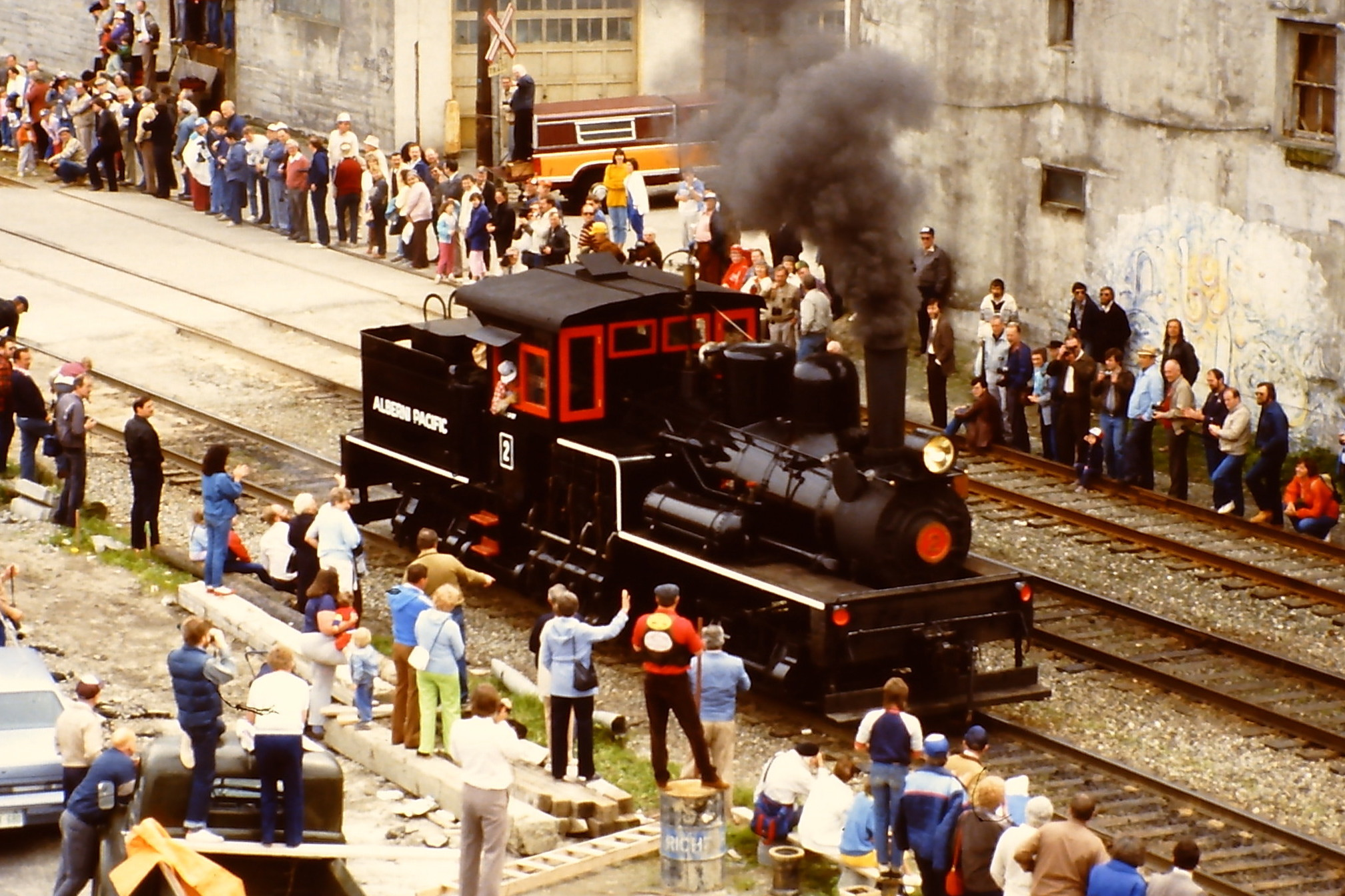 Albereni Pacific Nummer 2 auf der SteamExpo 86 in Vancouver